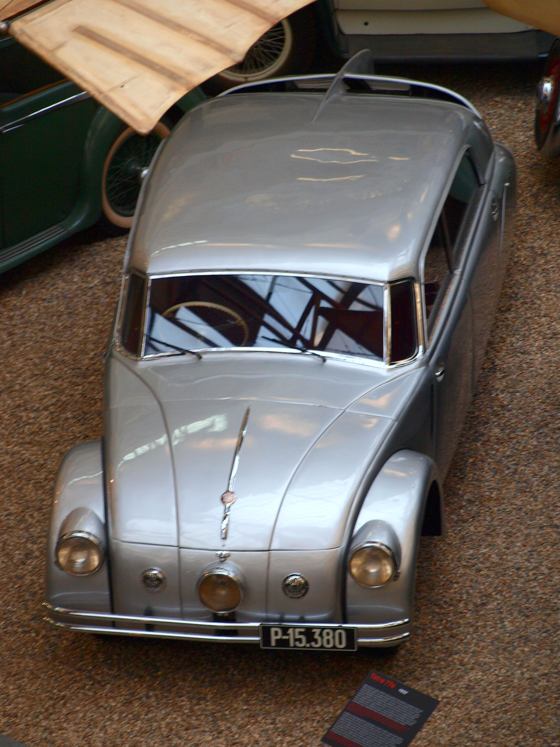 Národní technické muzeum v Praze